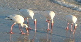 Ibis